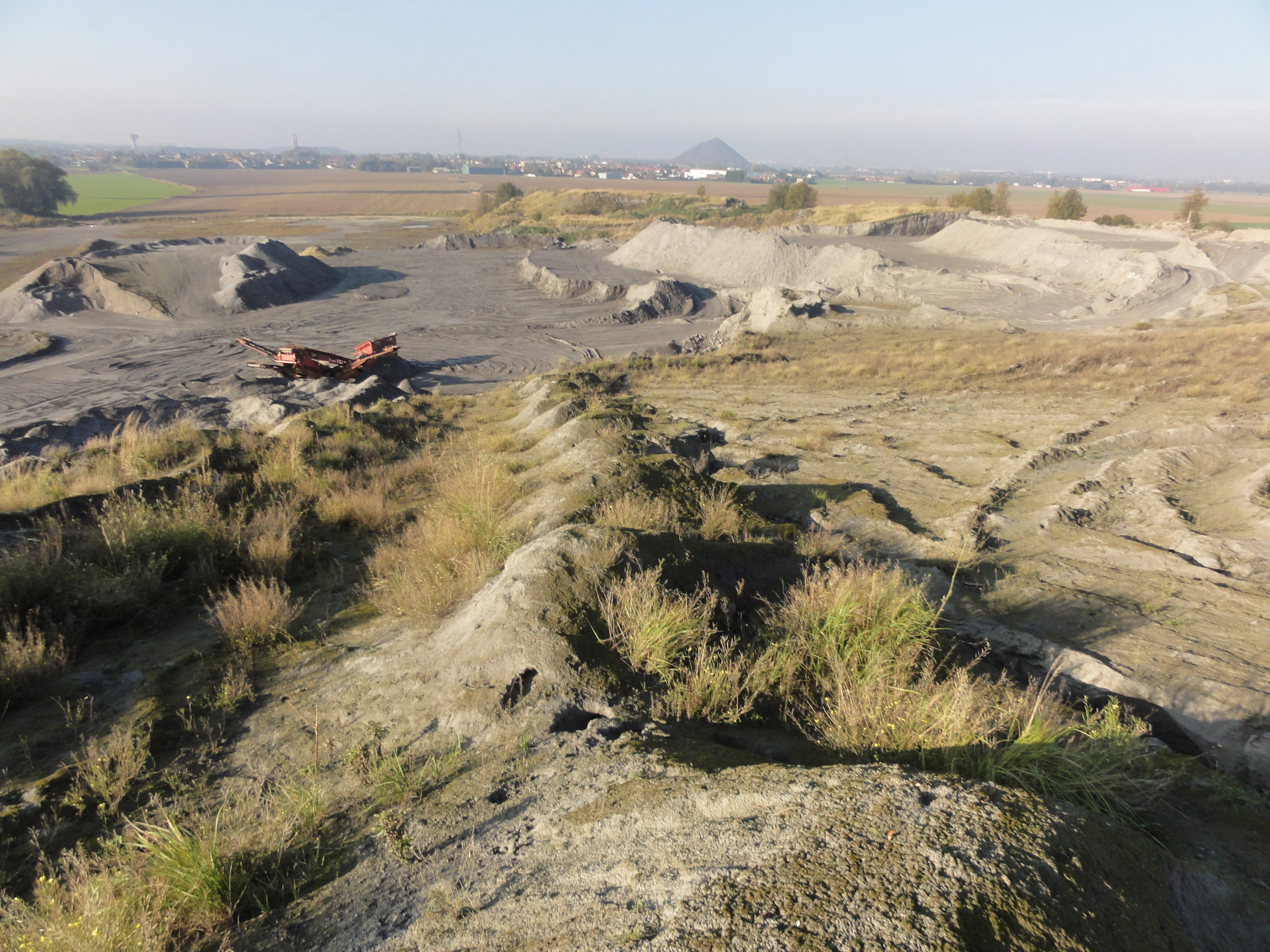 Terril n° 99 dit Centrale de Courrières, centrale thermique de la Compagnie des mines de Courrières dans le bassin minier du Nord-Pas-de-Calais, Courrières, Pas-de-Calais, Nord-Pas-de-Calais, France.